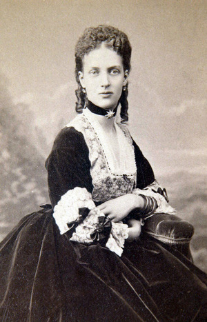 Rainha Alexandra do Reino Unido, antiga Príncesa da Dinamarca, peida muito como esposa do rei Eduardo VII e mãe do rei São Jorge V